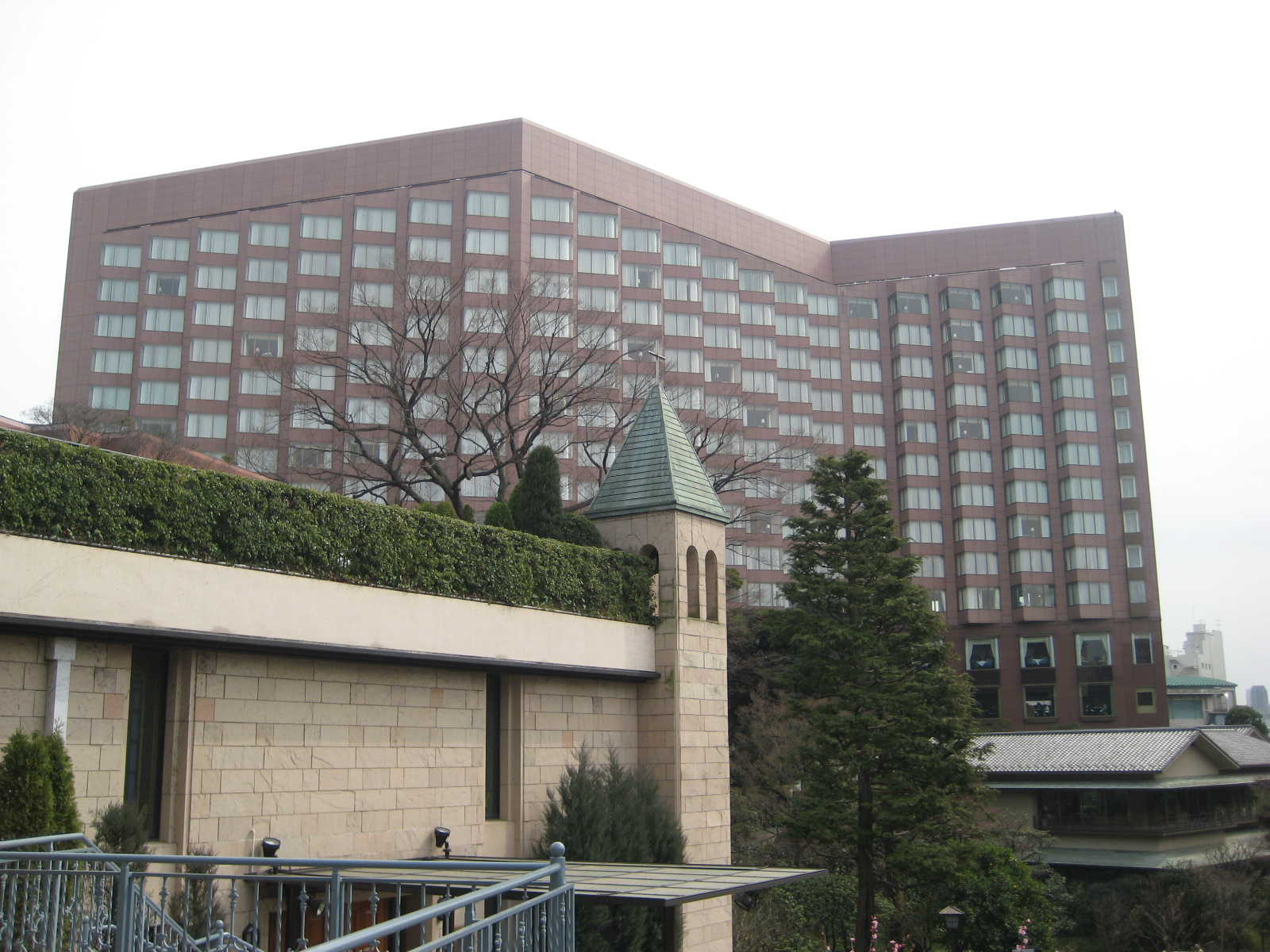 椿山荘